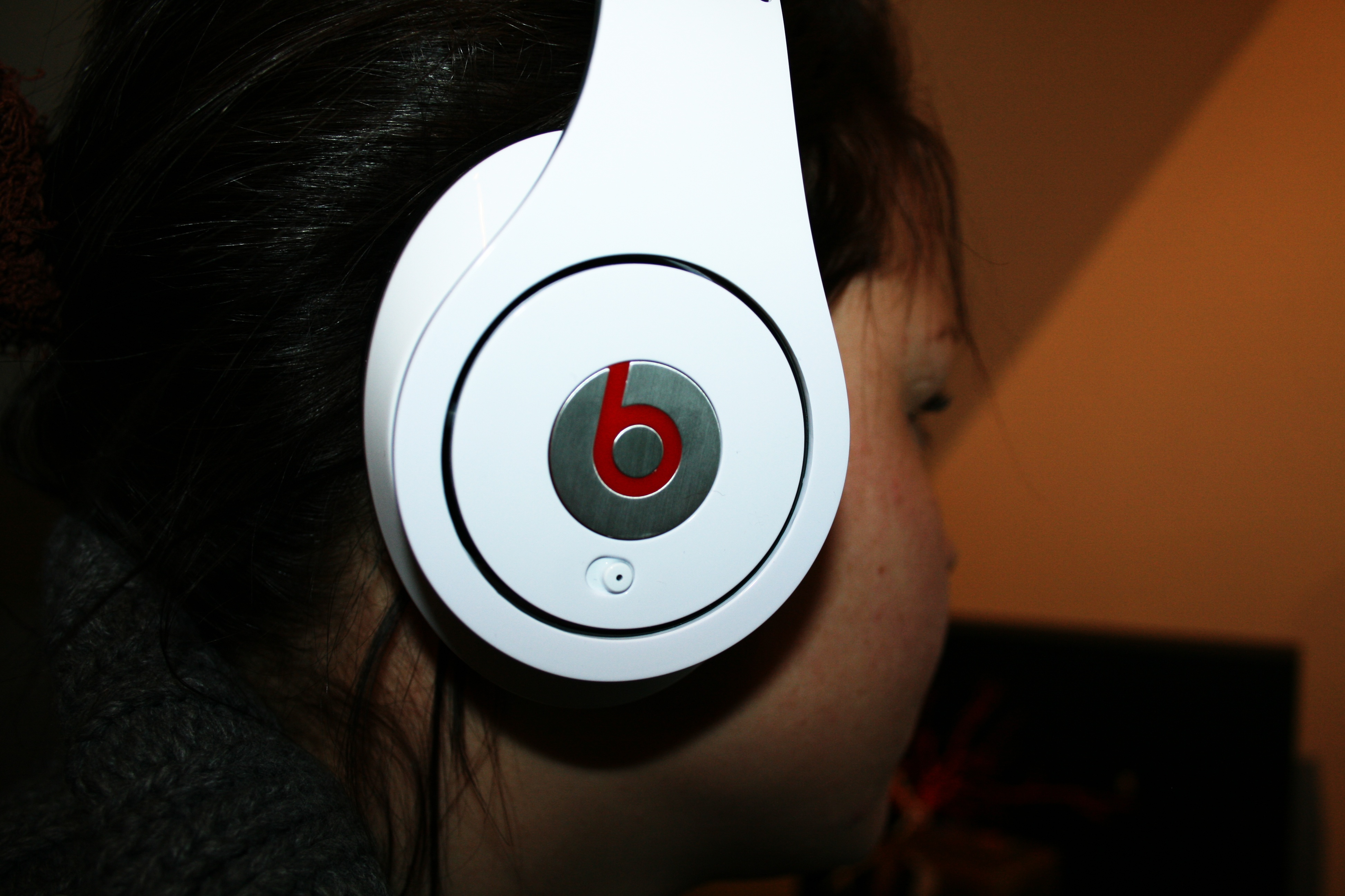 Beats